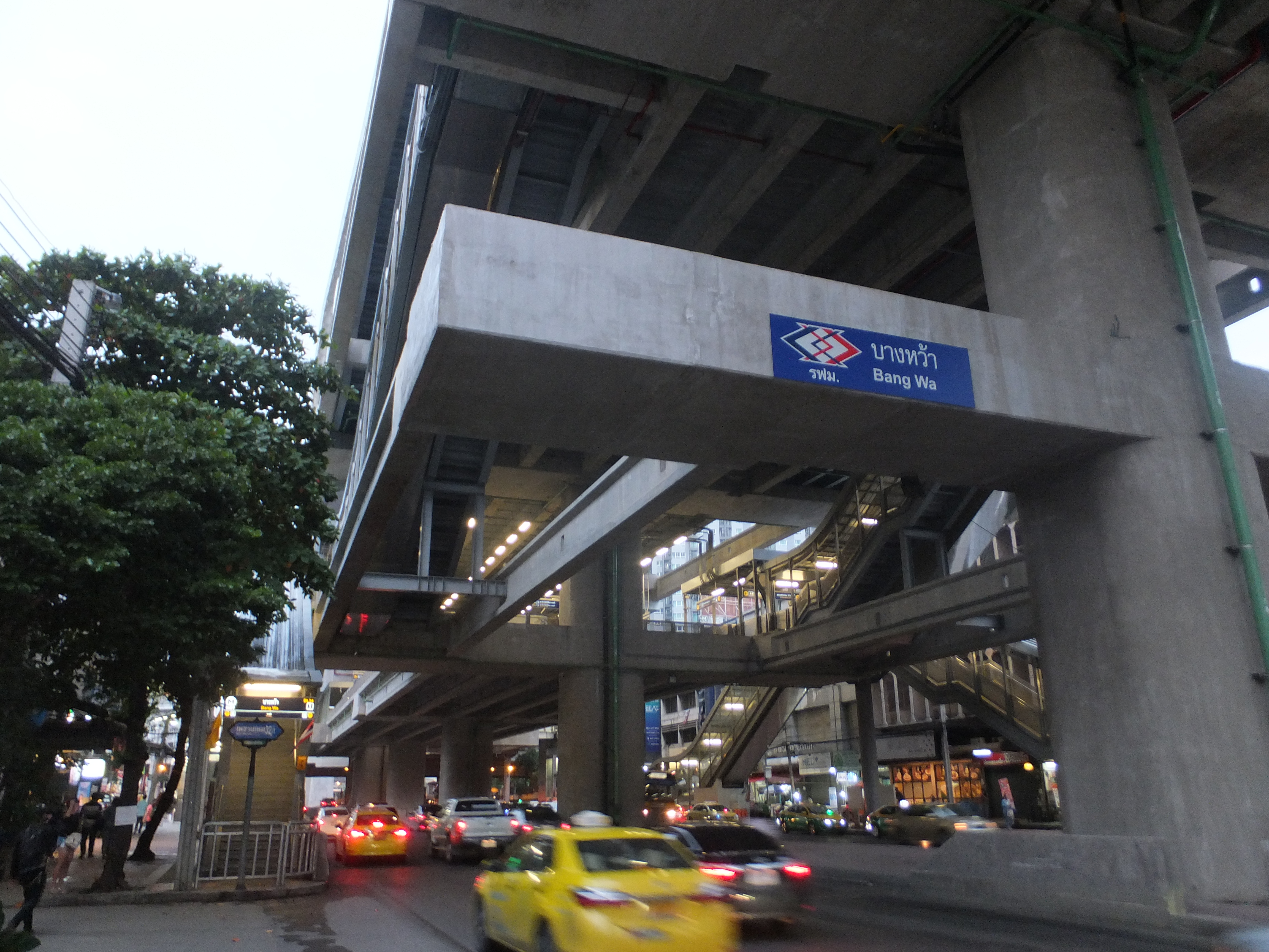 バンコク・メトロ、バーンワー駅①出入口